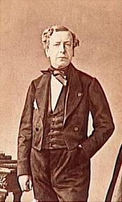 Paul de Royer (Paul-Henri-Ernest de Royer Dupré), ministre de la justice sous Napoléon III